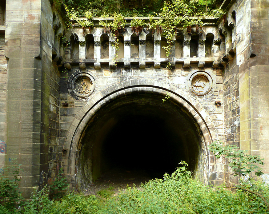 Volkmarhäuser Tunnel Südseite